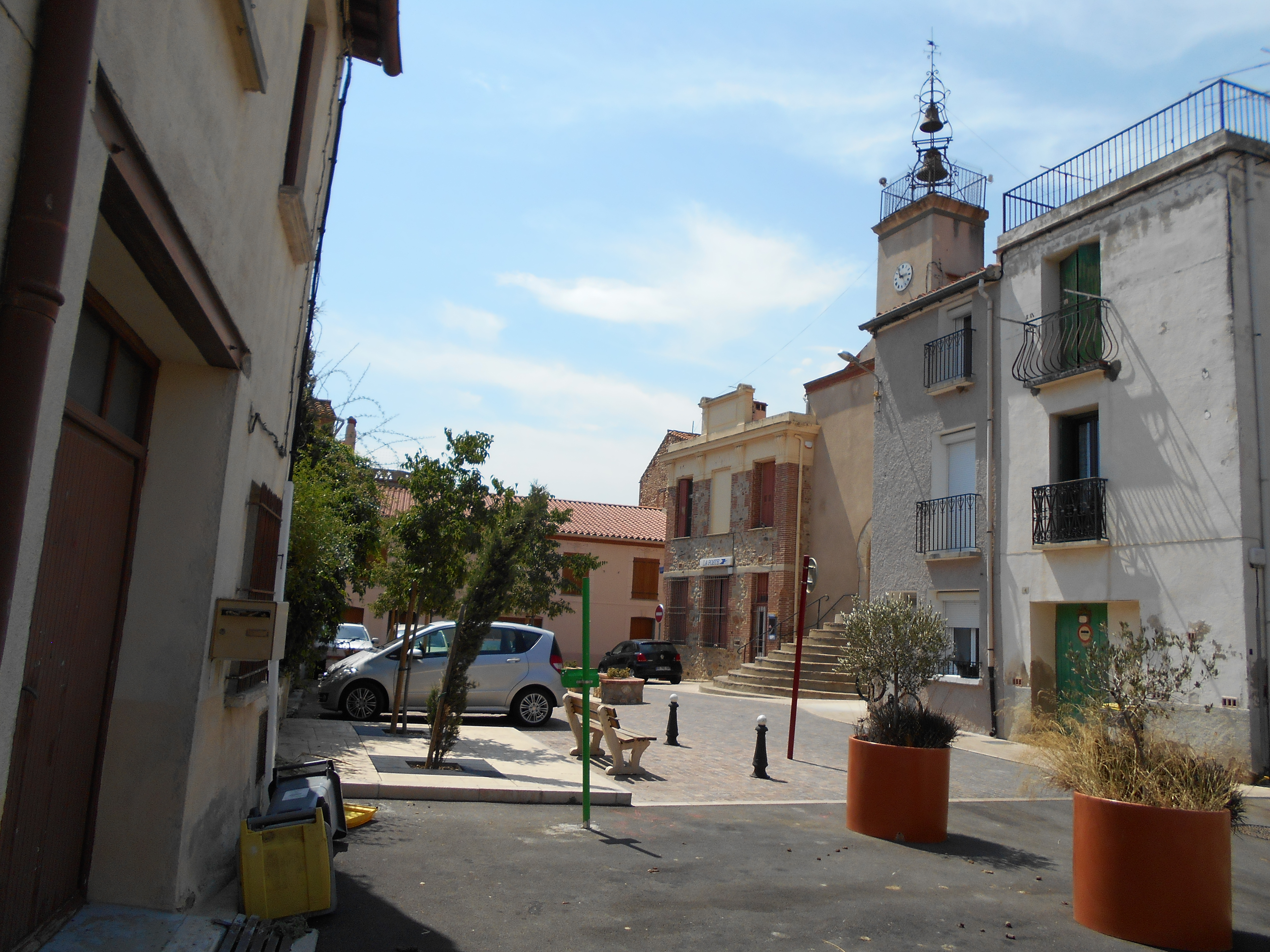 Plaça de l'Església de Paçà